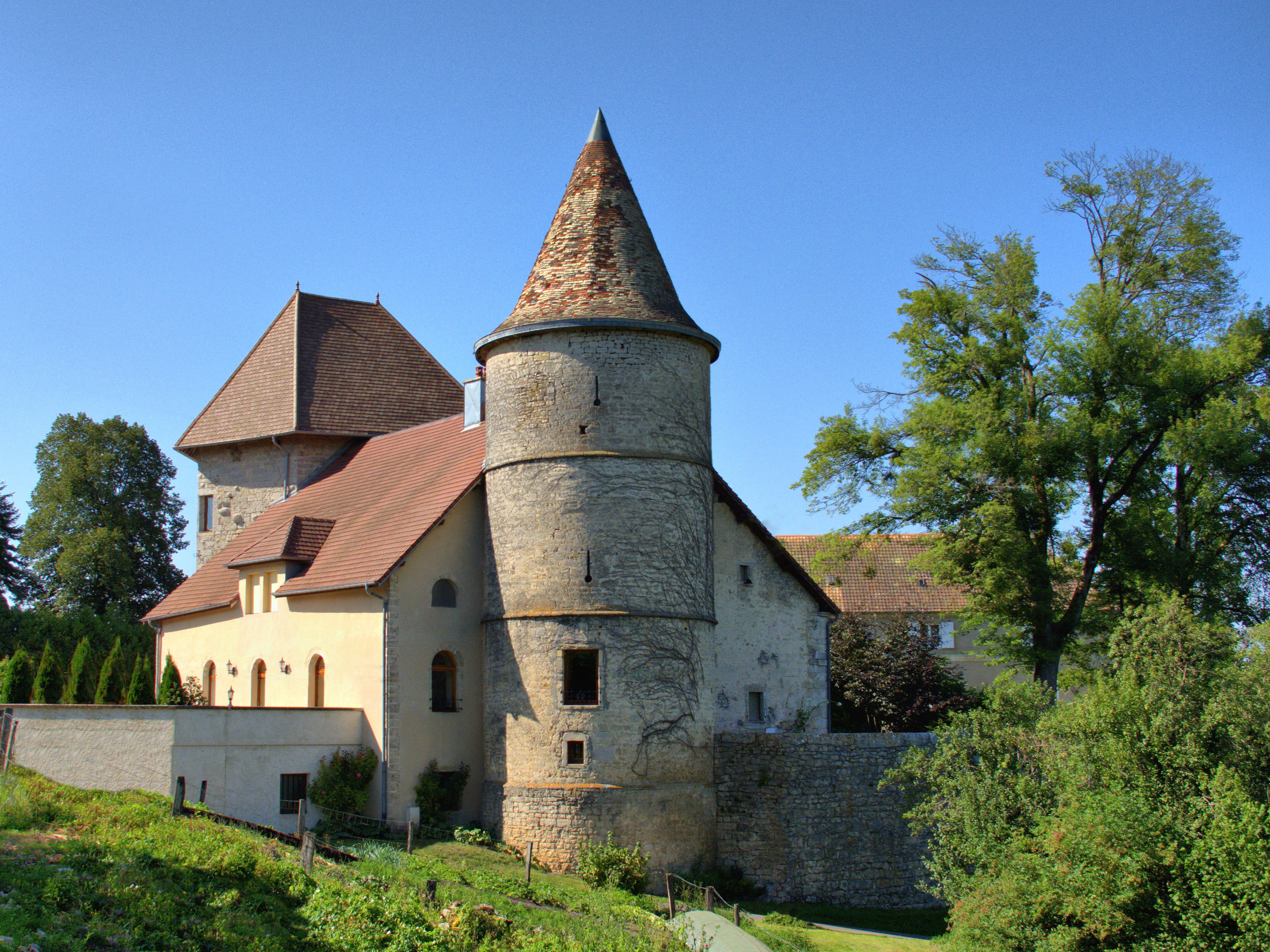 Le château